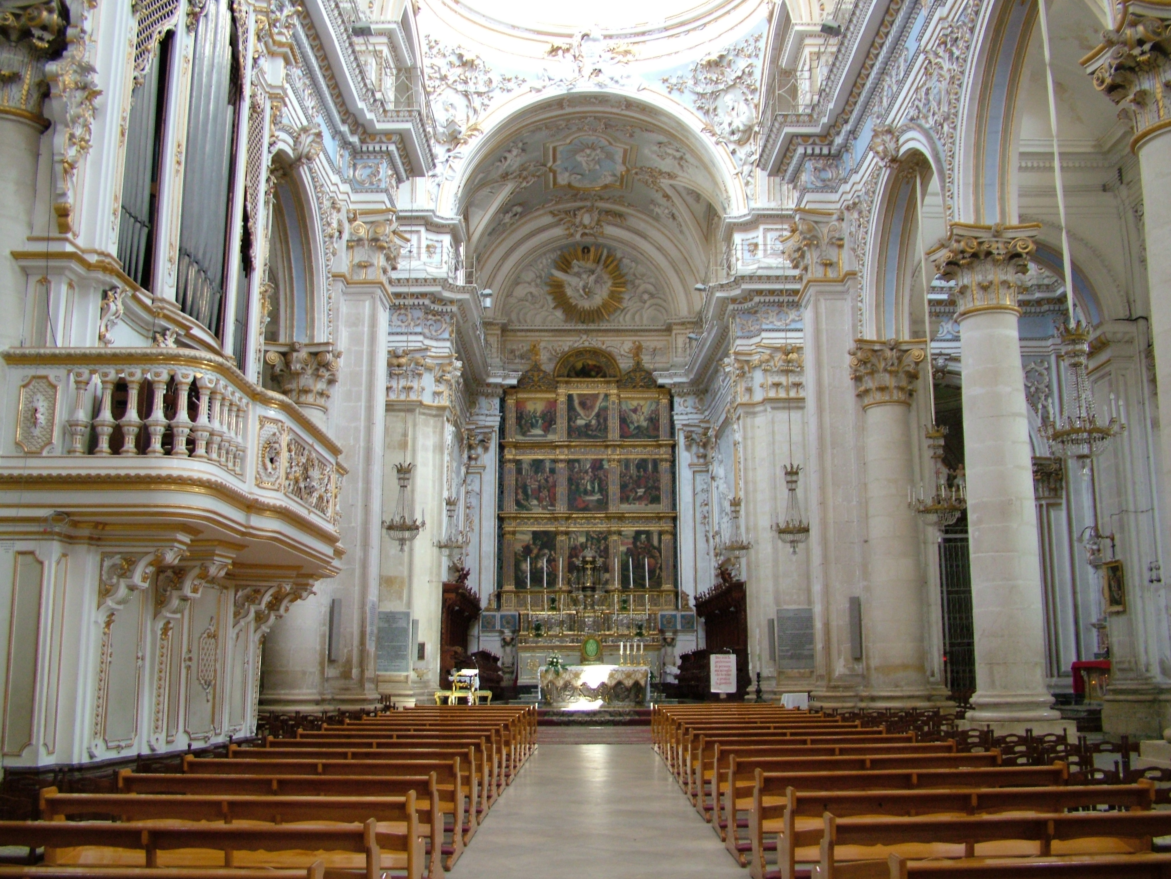 Modica, Sizilien, La Chiesa di S. Giorgio, der Innenraum